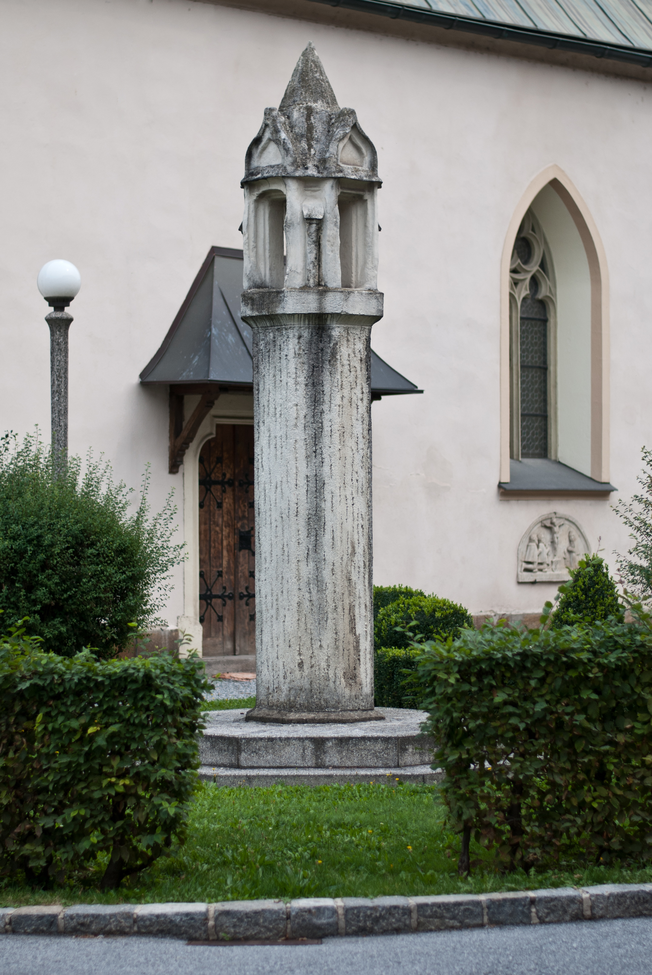 Lichtsäule bei der Kath. Filialkirche hl. Michael